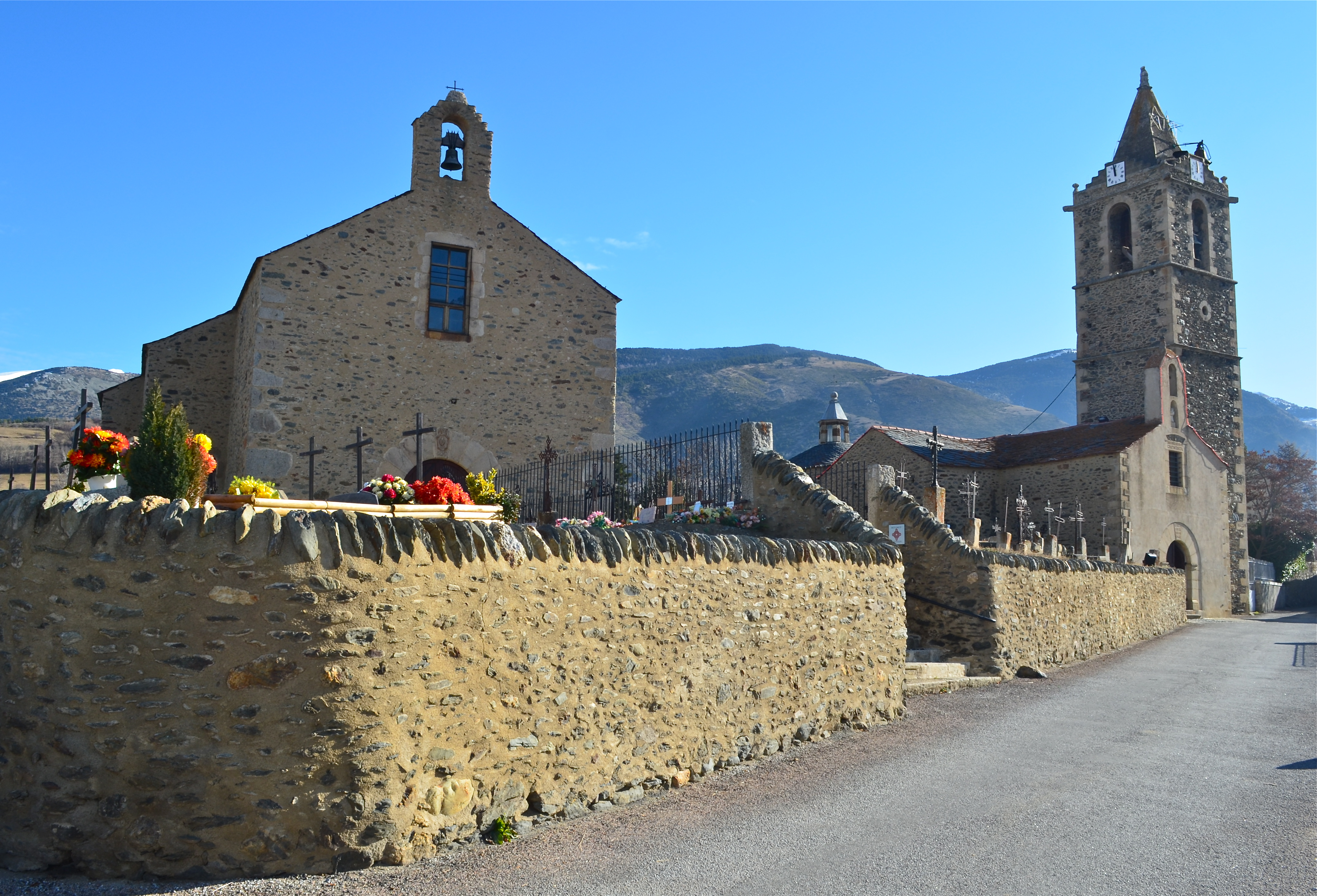 Eglise Saint-Génis d'Err et chapelle de la Vierge- Pyrénées-Orientales, France